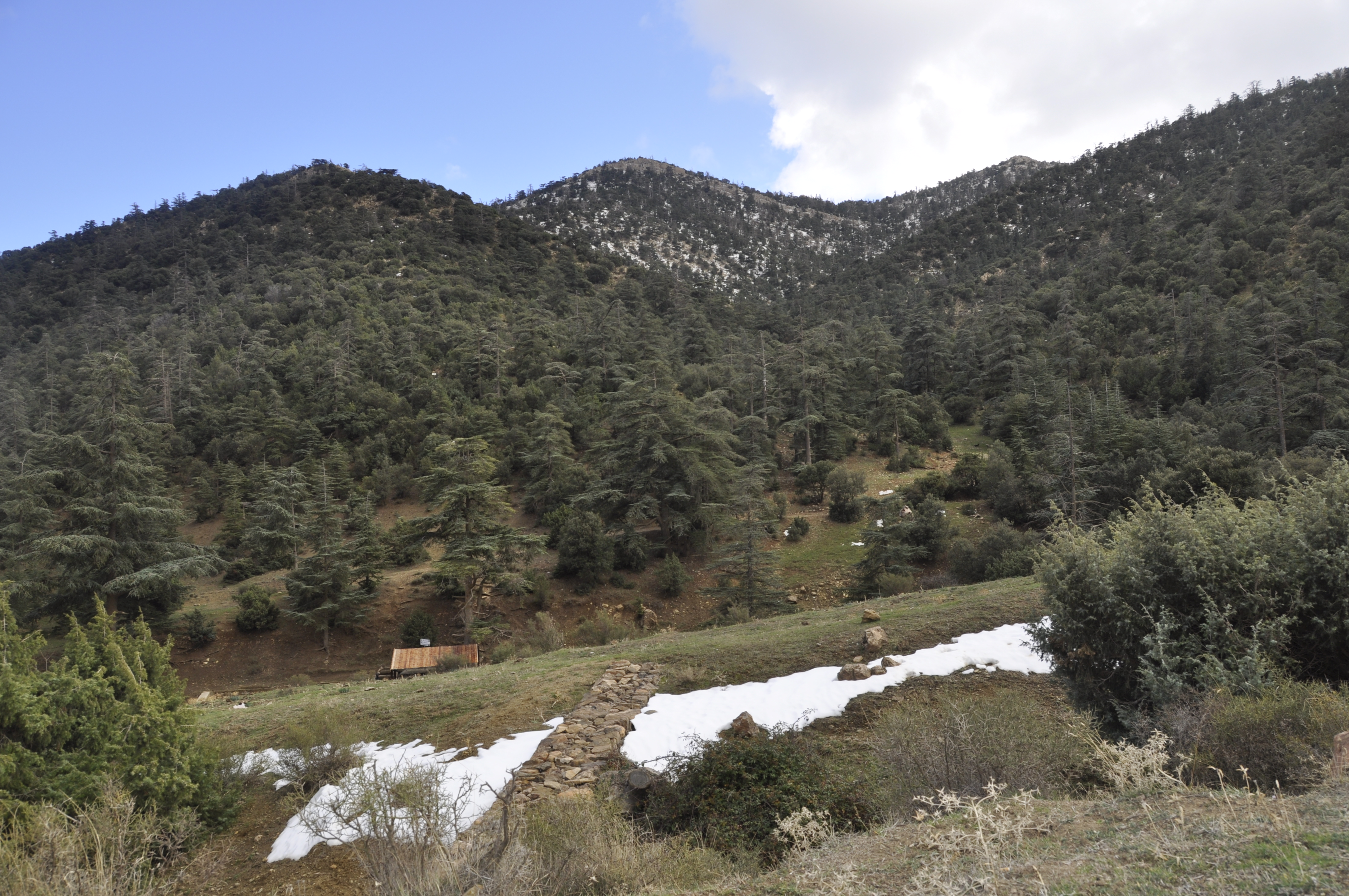 Parc National de Belezma